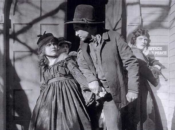 Molly Malone y Harry Carey en una escena de la película de John Ford La gota de sangre (The Scarlet Drop, 1918), historia de amor interclasista.